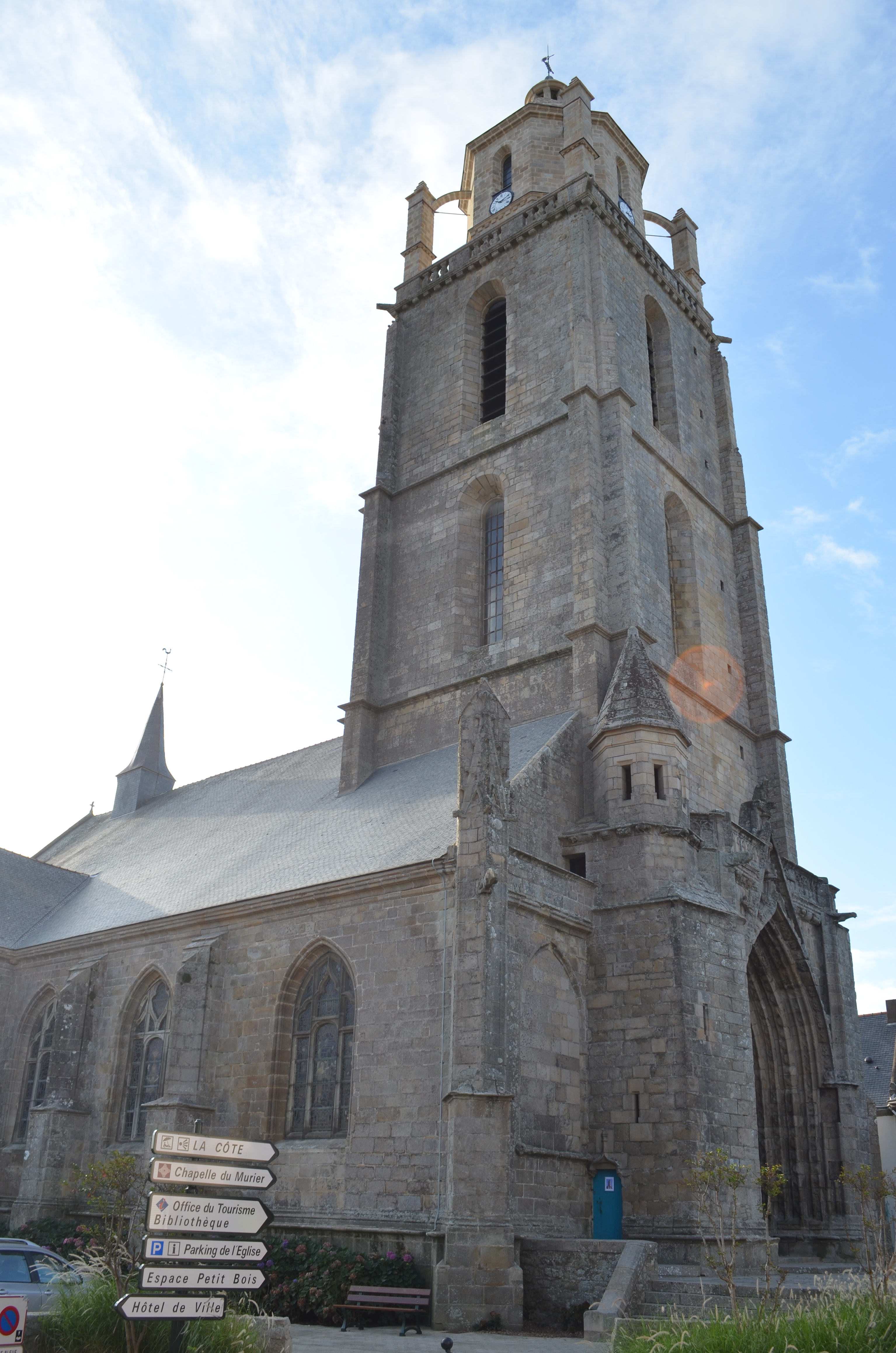 Eglise Saint Guénolé - Batz-sur-Mer (Loire-Atlantique)